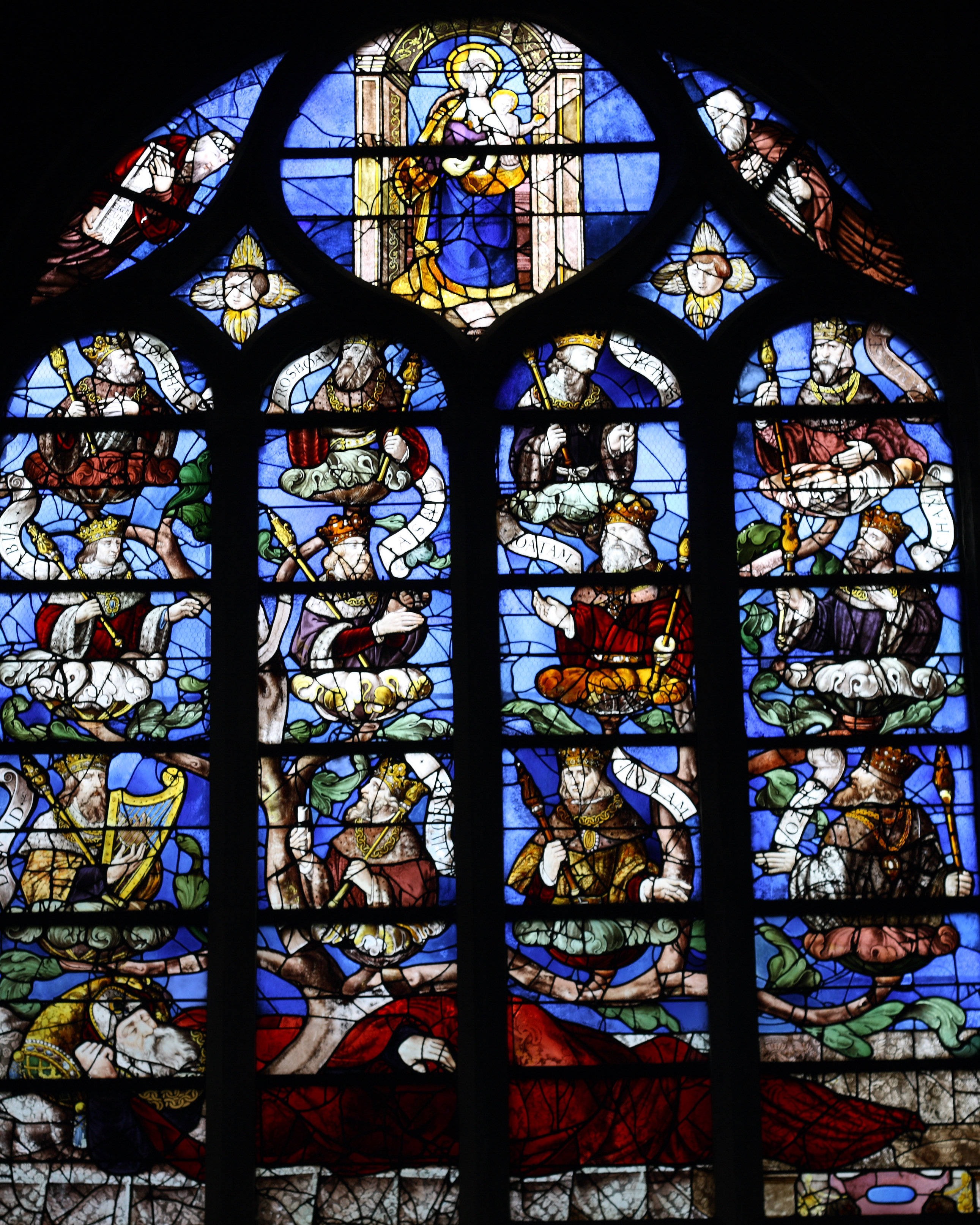 Bleiglasfenster (von 1572) in der katholischen Pfarrkirche Saint-Martin in Groslay, Darstellung: Wurzel Jesse, siehe Dominique Foussard, Charles Huet, Mathieu Lours: Églises du Val-d'Oise. Pays de France, Vallée de Montmorency, Société d'Histoire et d'Archéologie de Gonesse et du Pays de France, 2. Auflage, Gonesse 2011, ISBN 9782953155426